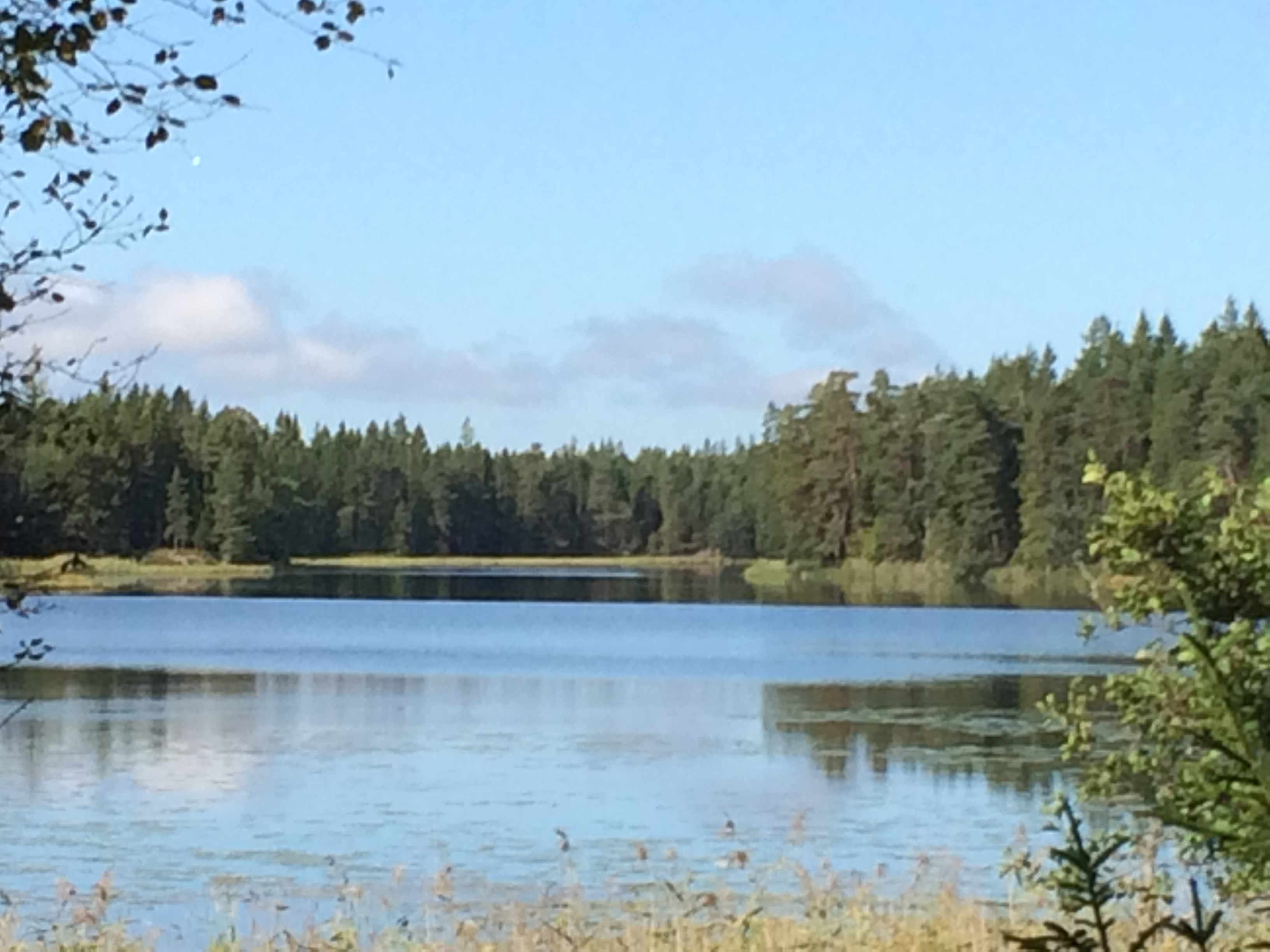 Långevattnet, Hunneberg